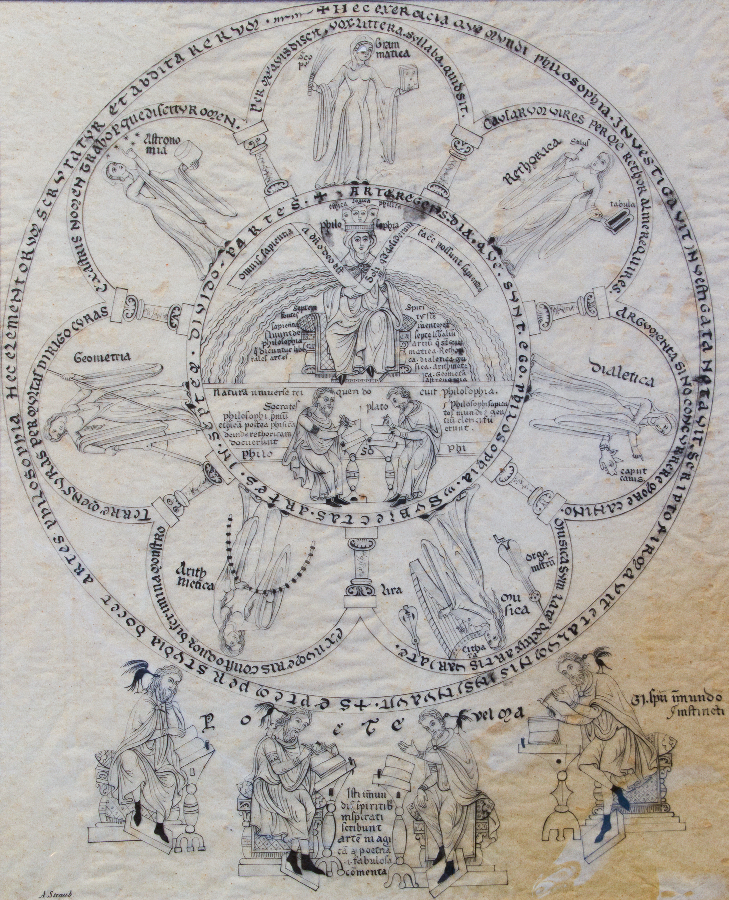 Calque du Hortus Deliciarum effectué par Straub d’après l’original avant sa destruction en 1871 lors du bombardement de la bibliothèque de Strasbourg.